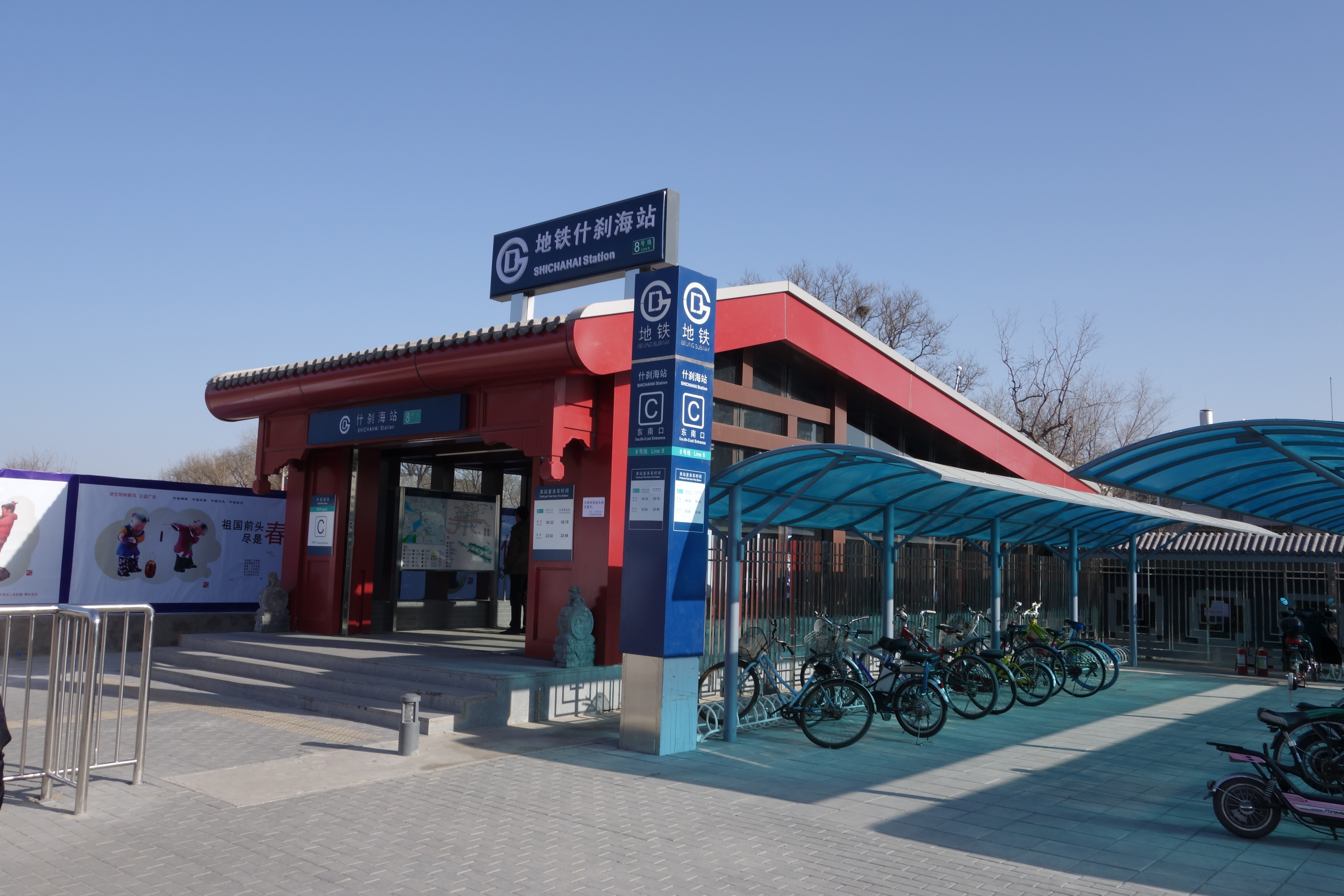 什刹海站C口